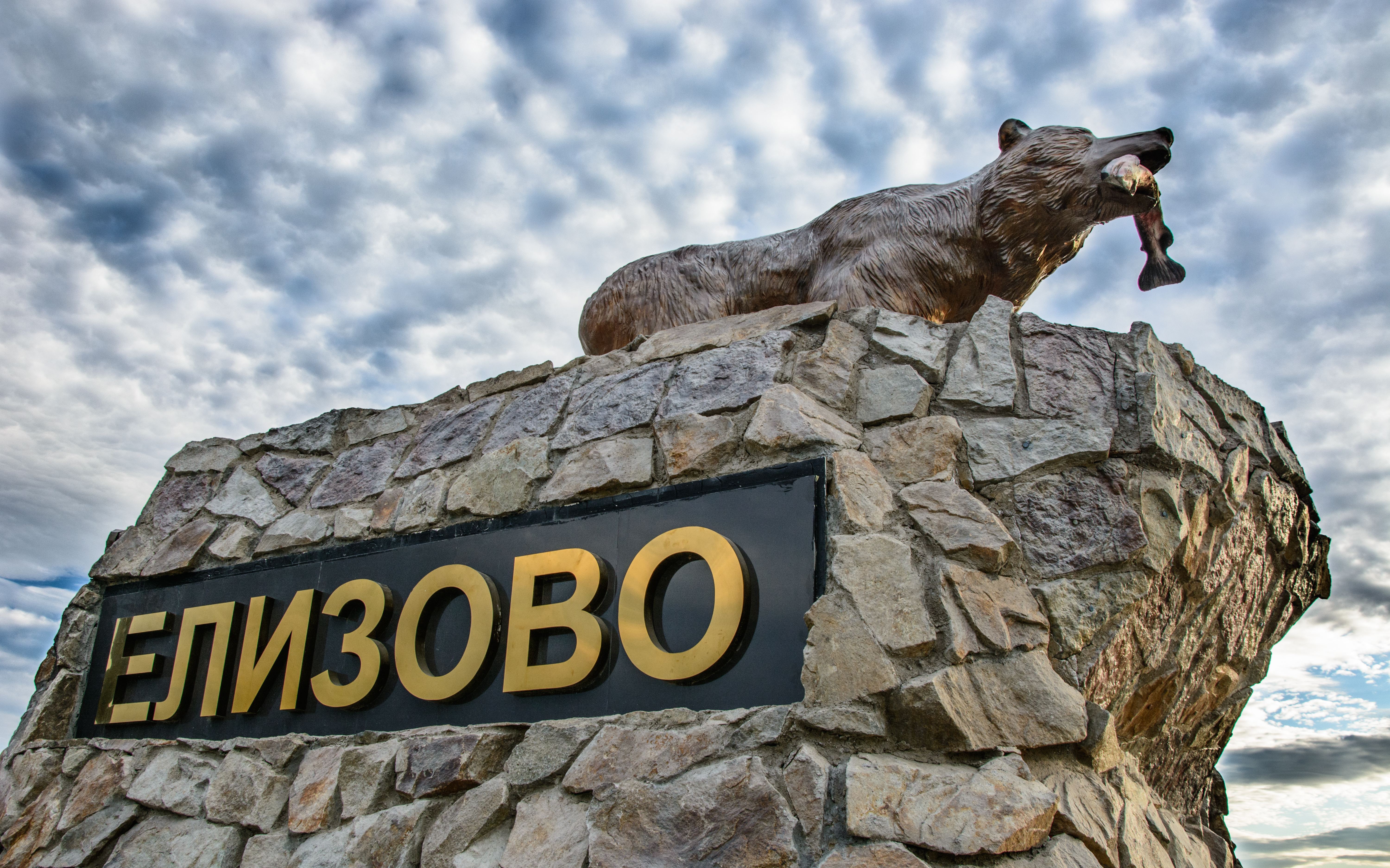 Monument in Elizovo, Kamchatka, Russia